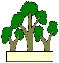 Glifo de Huautla, Hidalgo